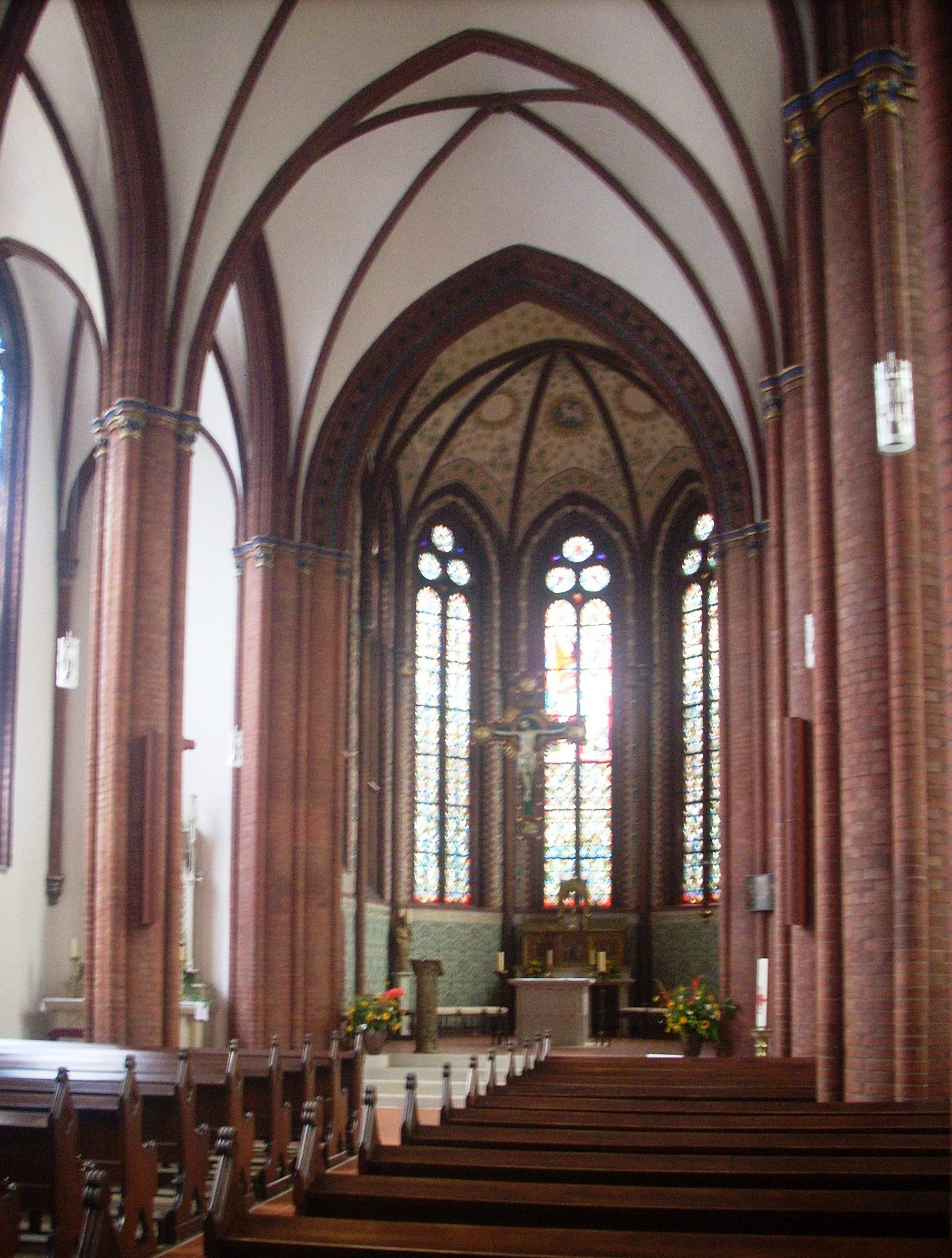 Peine, kath. Kirche Hl. Engel, Inneres